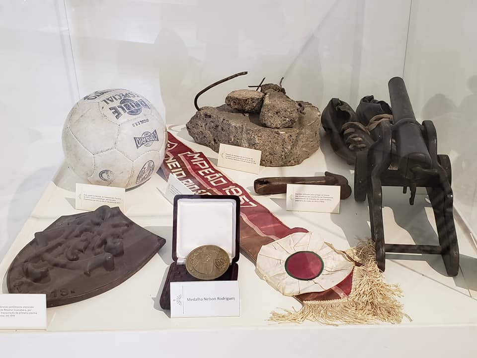 Objetos comemorativos da conquista do Torneio Rio-São Paulo de 1957, entre outros, em exposição na Sala de Troféus do Fluminense Football Club.